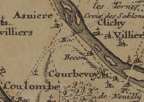 Plan du terroir de St-Denis en France et des paroisses de La Chapelle d'Aubervilliers, de la Cour Neuve, de Stains, de Pierrefitte, de Villetaneuse, d'Epinay et St-Ouen. XVIIIe siecle.